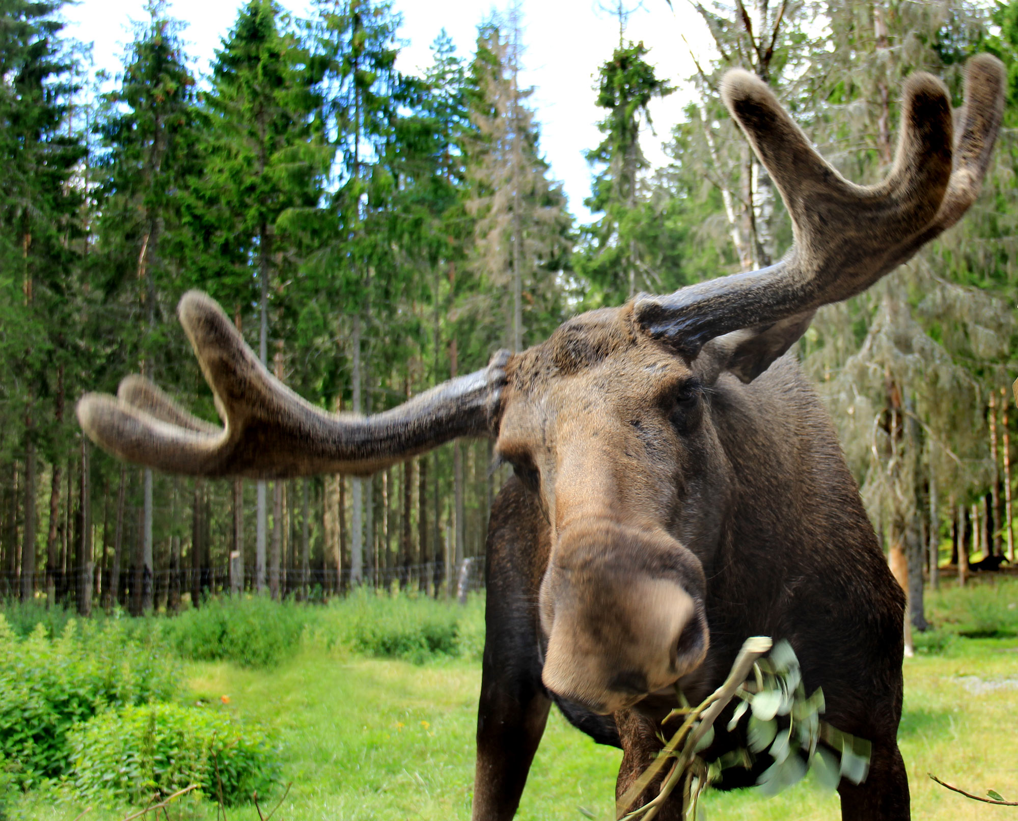 Elgparken, Ed, Sweden